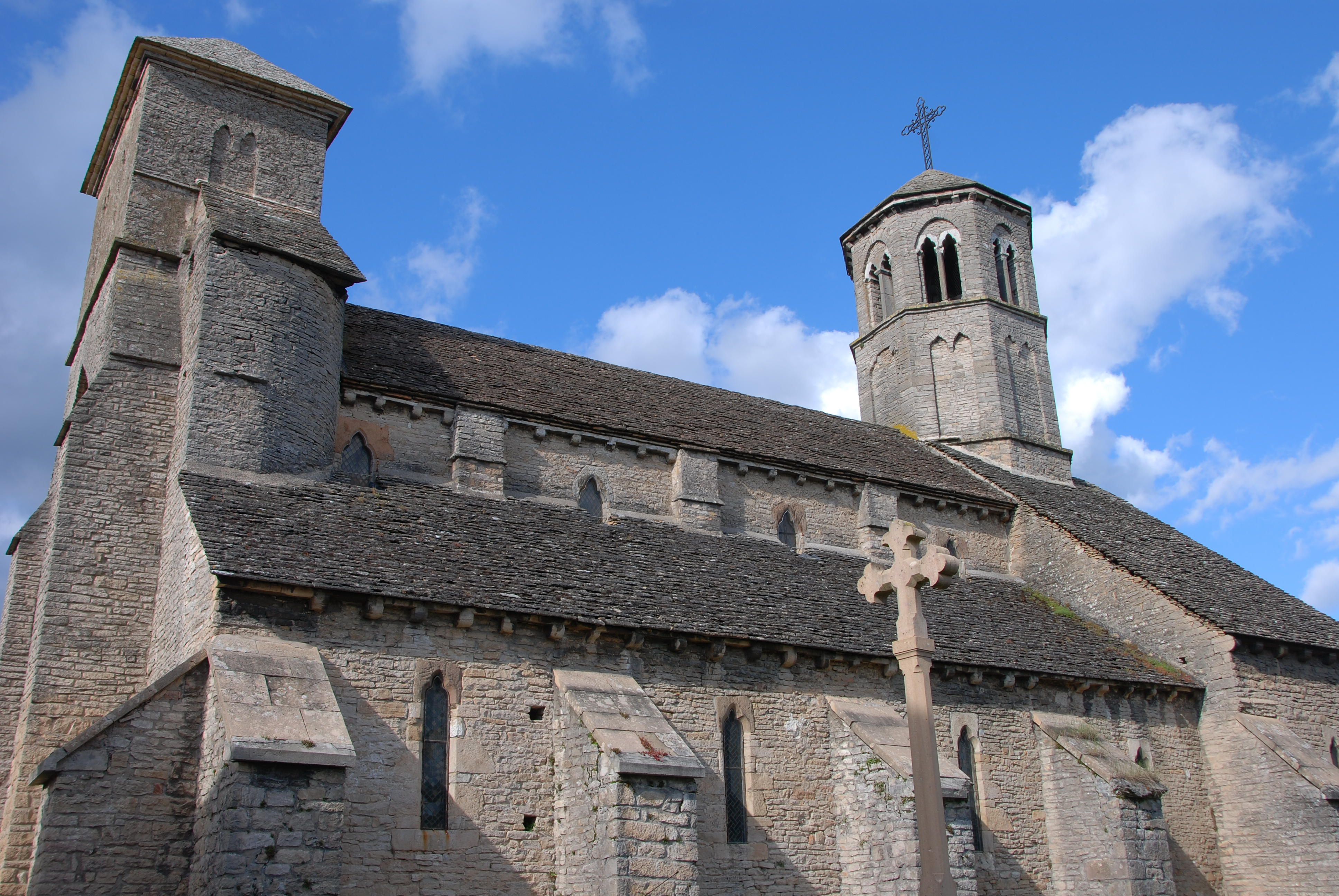 Église Saint-Albain de Saint-Albain, (Classé, 1929) .